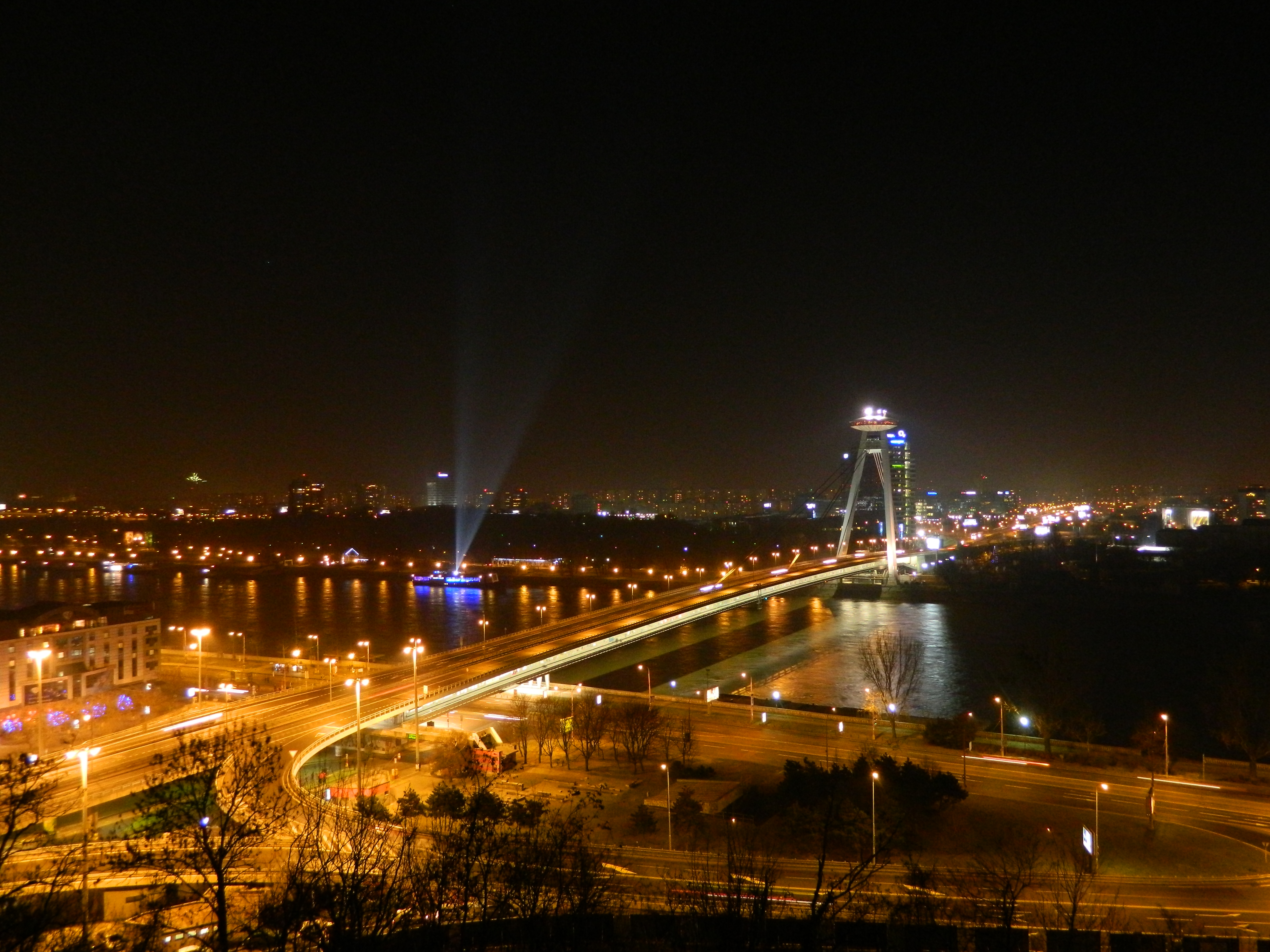 Мост СНП ночью